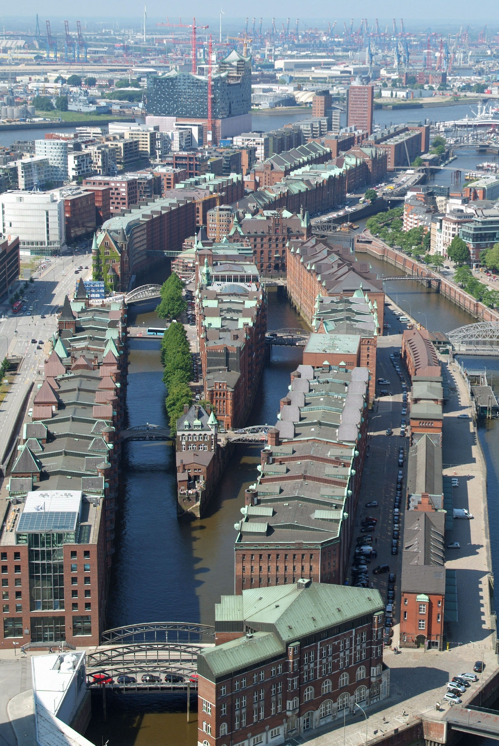 Projekt Heißluftballon